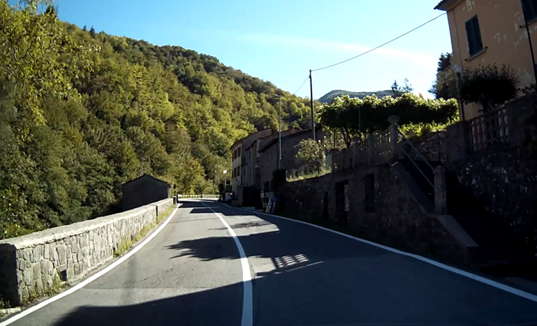 Sambuca Pistoiese, frazione Casoni